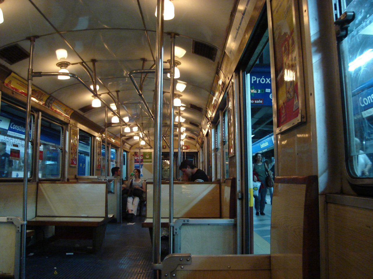 Vista del interior de un coche Siemens de la línea C de la red de subterráneos de la Ciudad de Buenos Aires detenido en la estación terminal Constitución.